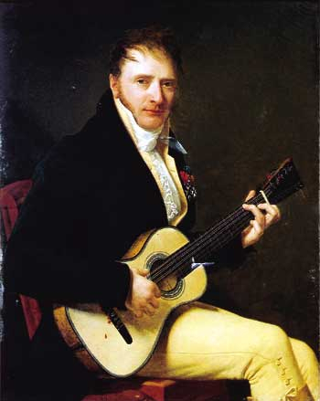 А.-Ф. Ризенер. Портрет графа Ш.-А. Тертра играющего на гитаре (1813-1814)